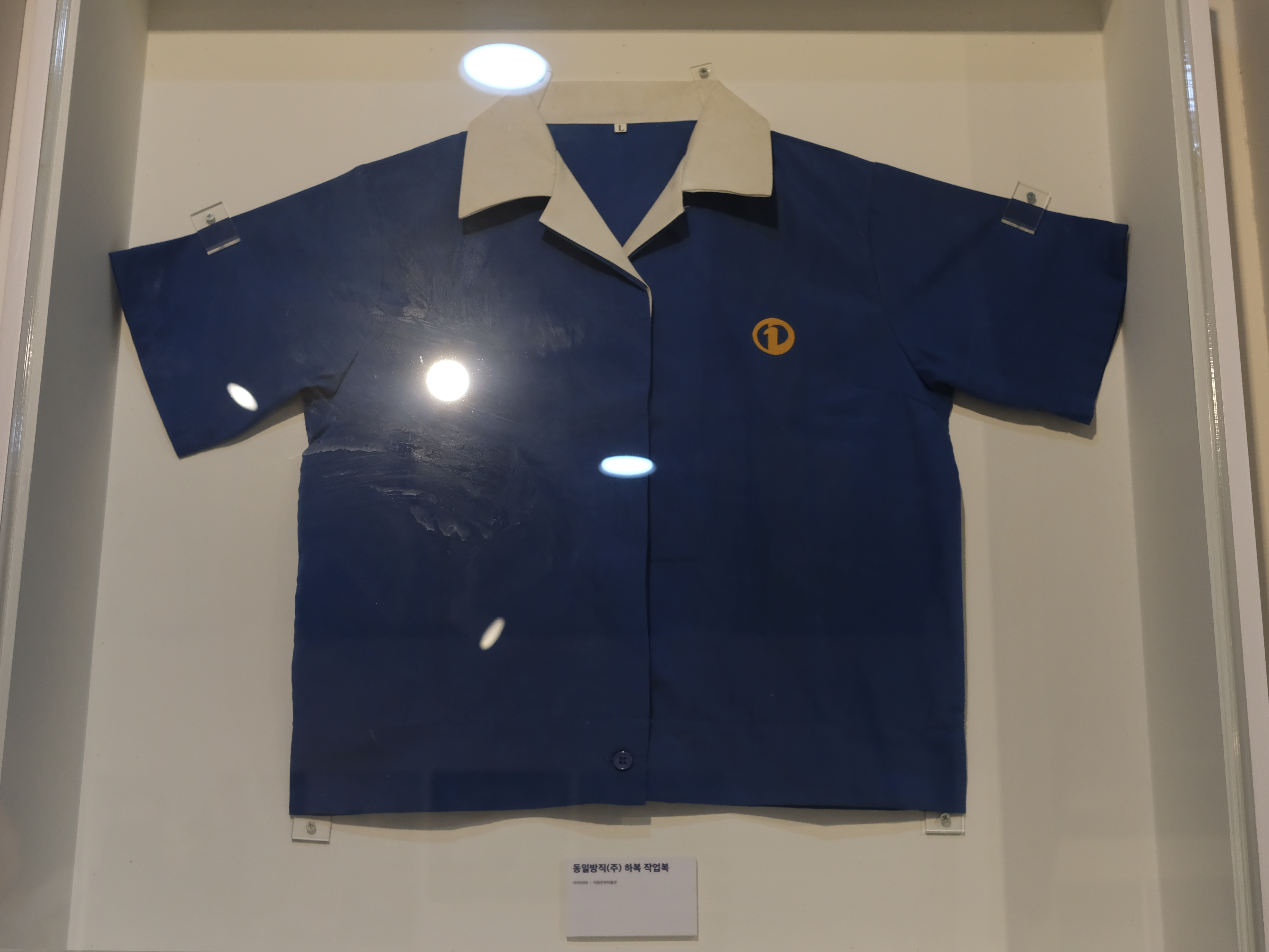 동일방직 여름 작업복, 국립민속박물관 소장, 인천광역시립박물관에서 촬영